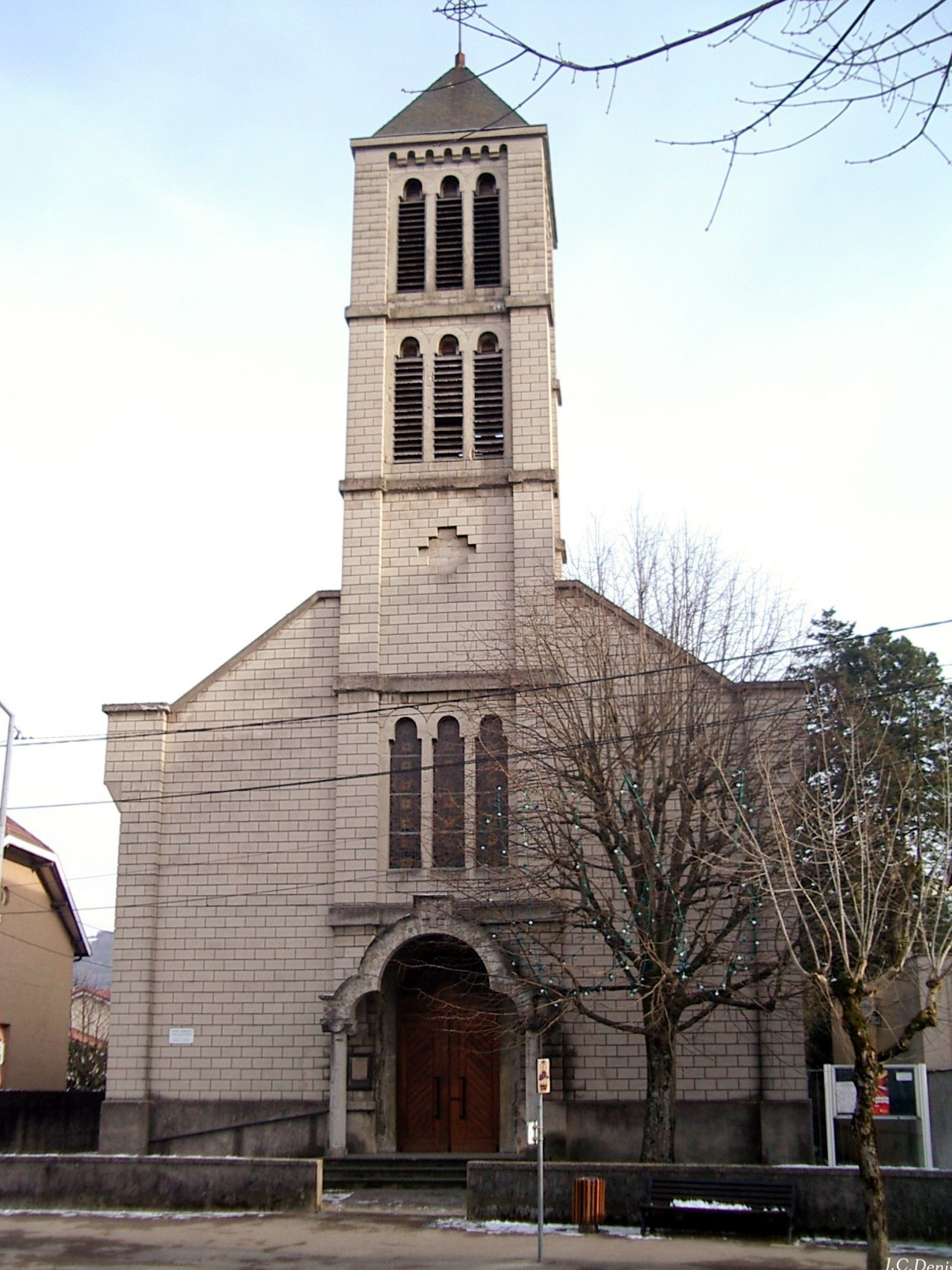 L'église à proximité de la gare d'Ambérieu-en-Bugey.